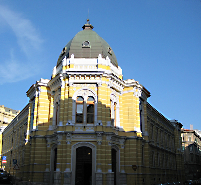 Srednja talijanska škola u ulici Dolac, Rijeka